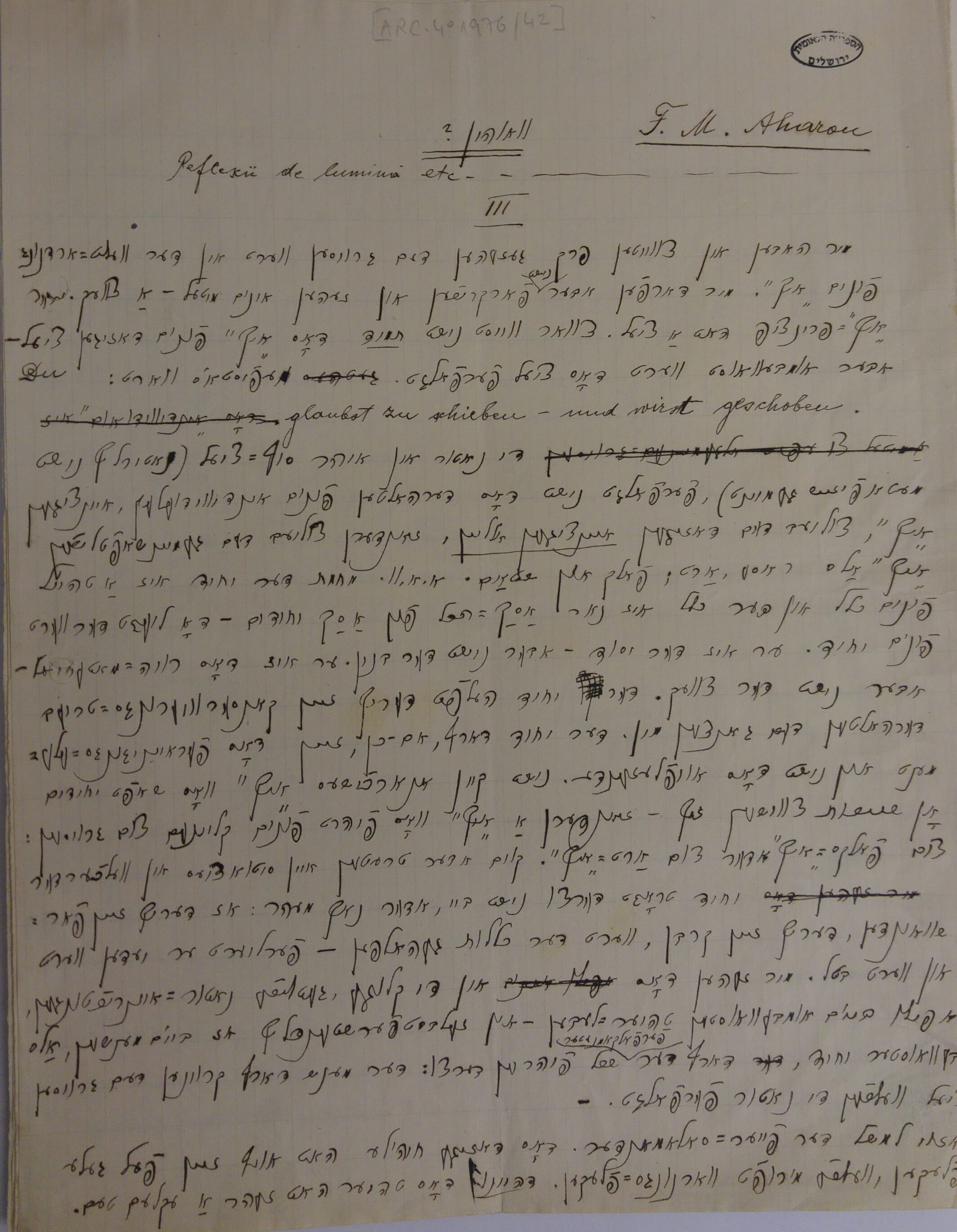 חלק שלישי ממאמרו של הרב מתתיהו אהרן פרידמן "וואהין?" (לאן?) בנושא ערכו של הפרט בכלל. התפרסם בגליון 20-21 של כתב העת "התקווה" ב-5 באפריל 1916.